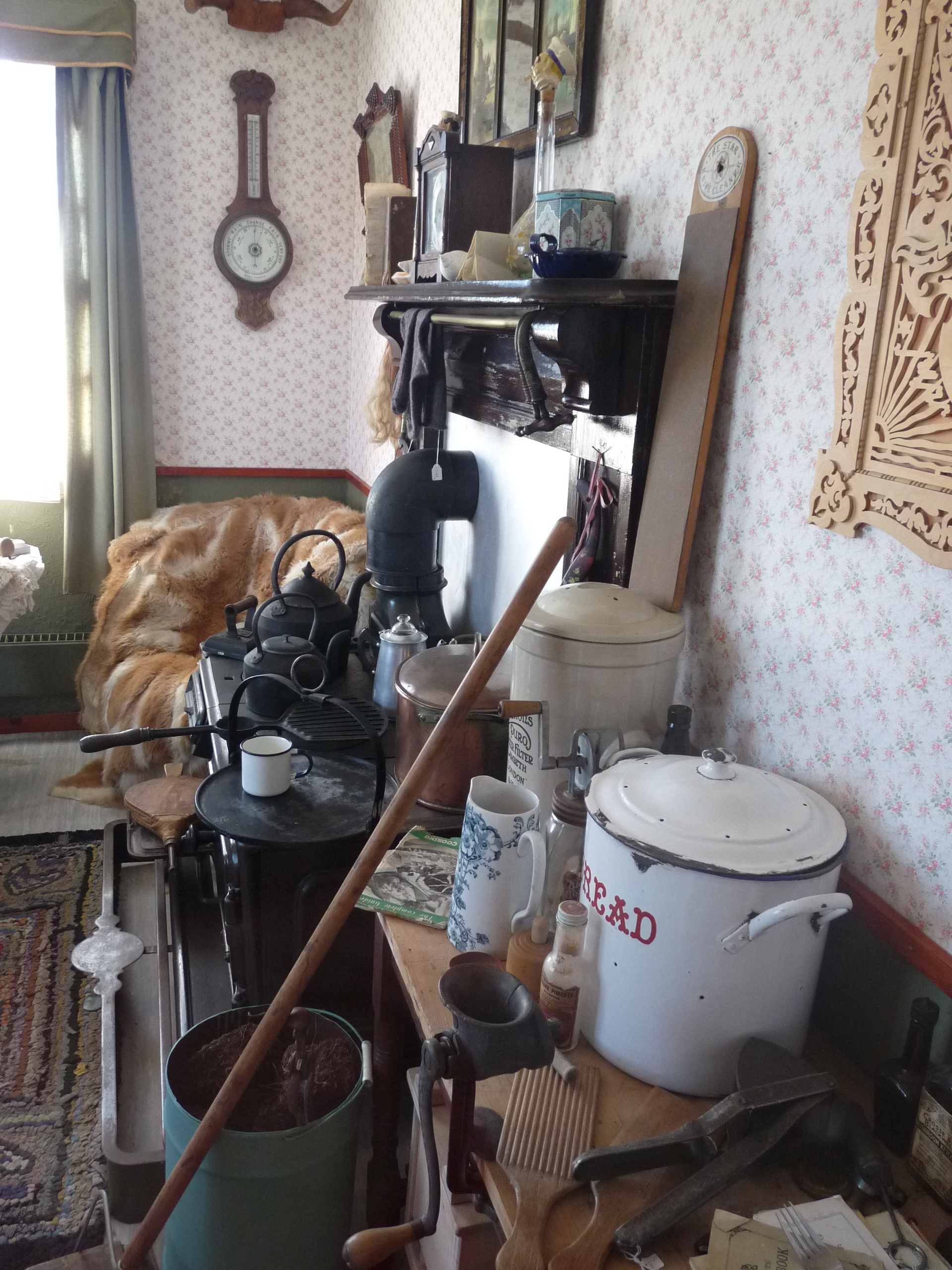 Museum 03